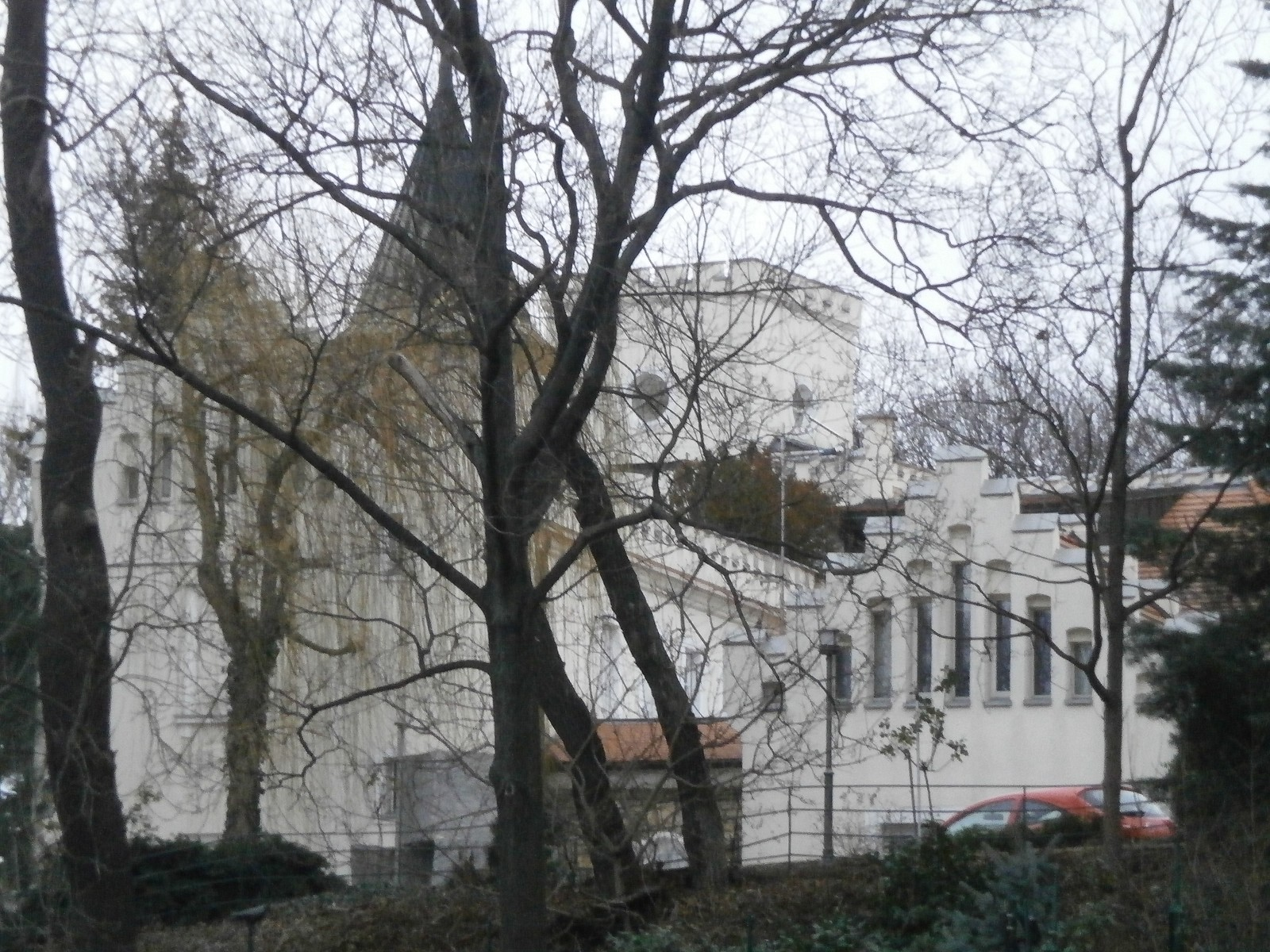 Praha - Nusle, Na Bučance 13 - Vila Bělka, pohled od ZJZ